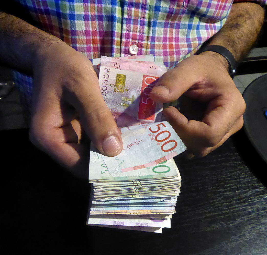 En person räknar en bunt med olika Svenska sedlar.